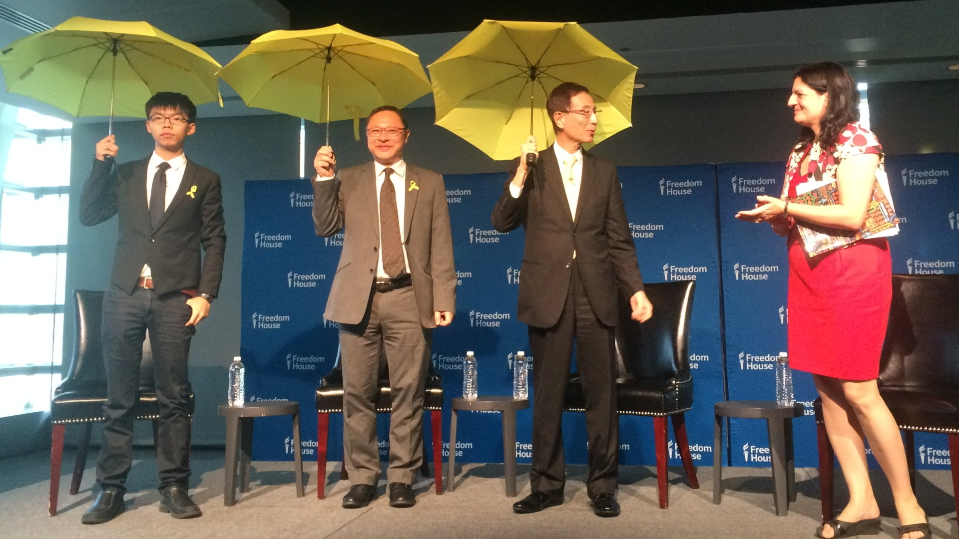 學民思潮召集人黃之鋒（左起）、佔中發起人戴耀廷及香港民主黨創黨主席李柱銘出席美國人權組織自由之家在華盛頓新聞博物館舉辦的75週年慶祝特別活動。